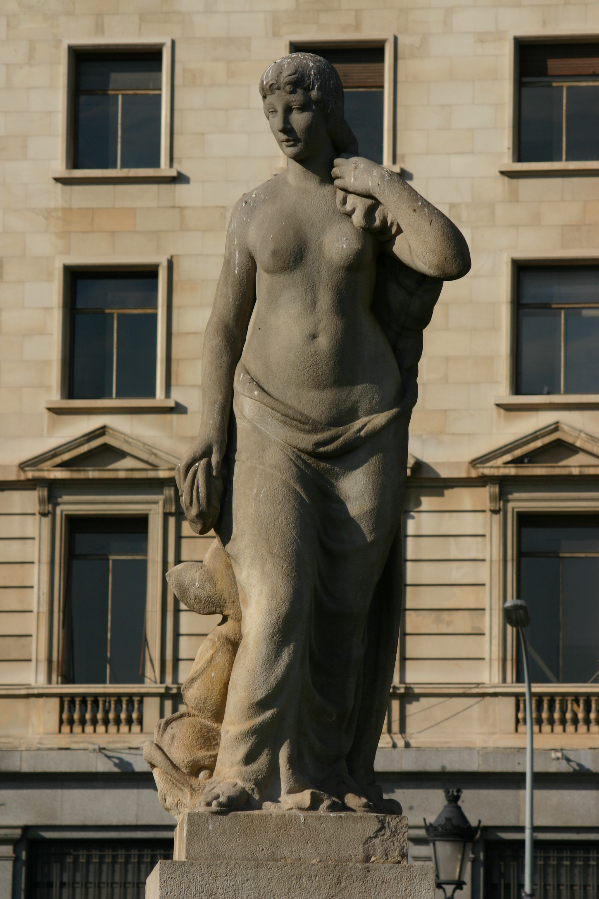 Figura Femenina. Plaza Catalunya. Barcelona (Spain)